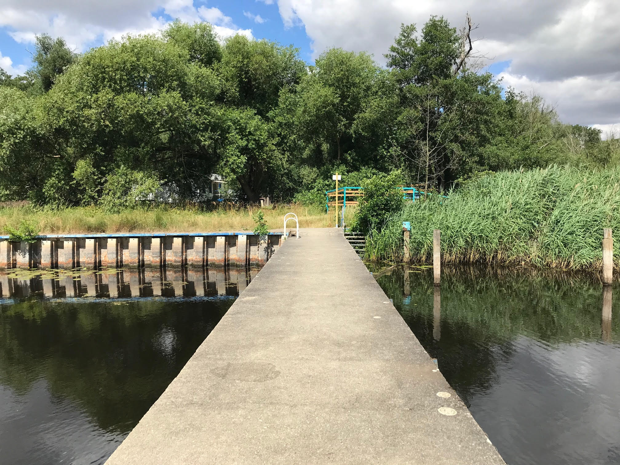 Badesteg mit Gelände des Flussbad Rehsumpf (Dessau). Im Hintergrund rechts der "Schweinekasten", zwischen den Bäumen links die Kabinen.